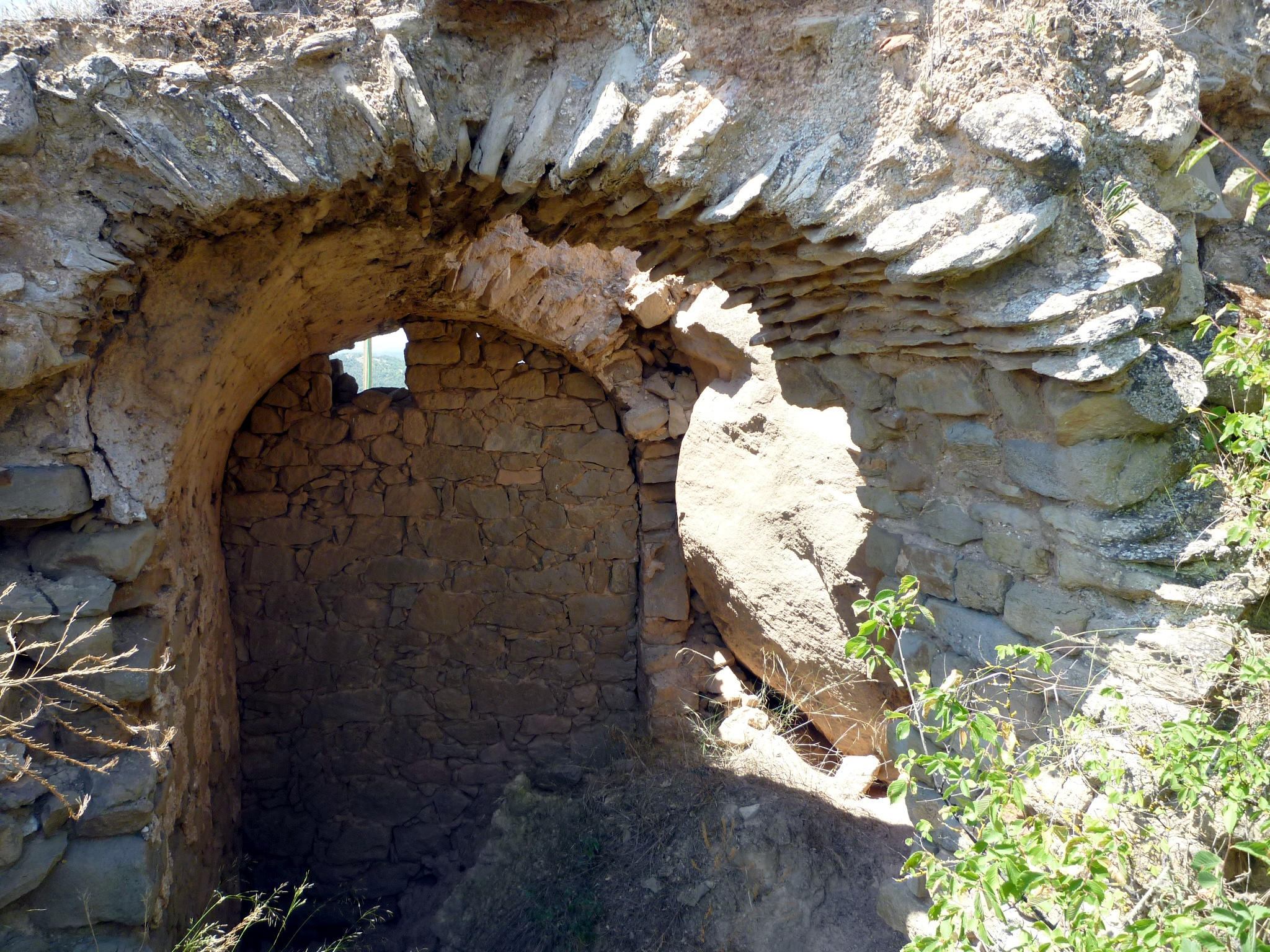 Castell de Valdàries (Vilanova de l'Aguda)